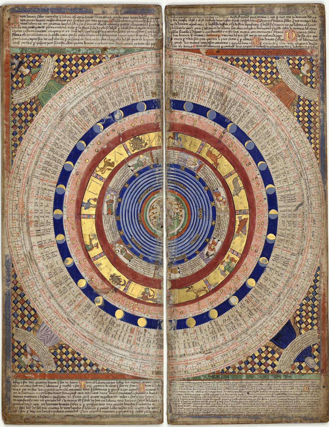 Full 2 de l'Atles Català de Biblioteca Nacional de França